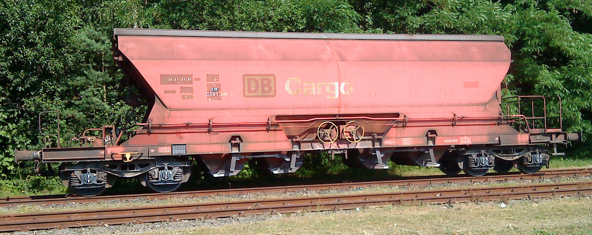 Tanoos 896 der DB, ein Wagen mit öffnungsfähigem Dach und mittig tief liegender, schlagartiger Schwerkraftentladung, gebaut ab 1998 beim Waggonbau Niesky